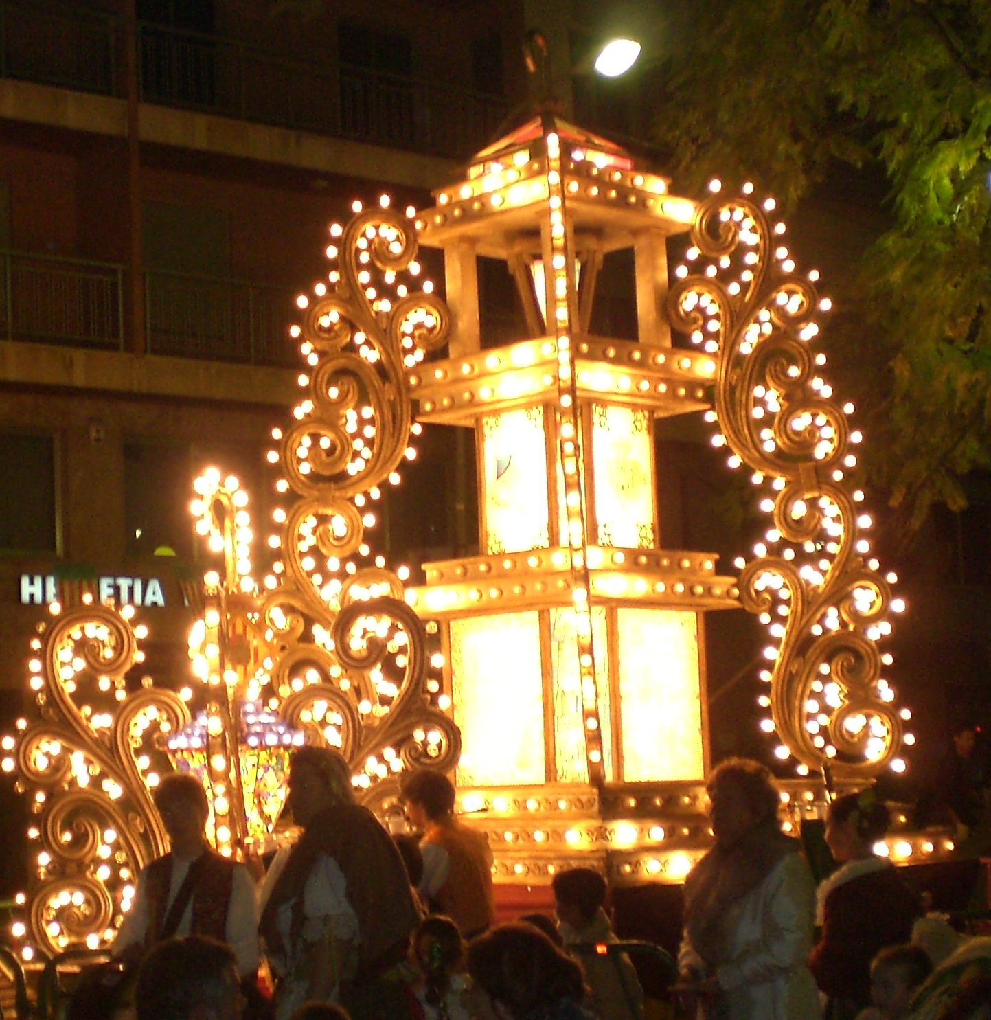 Gaiata de las fiestas patronales de la Magdalena, en Castellón de la Plana